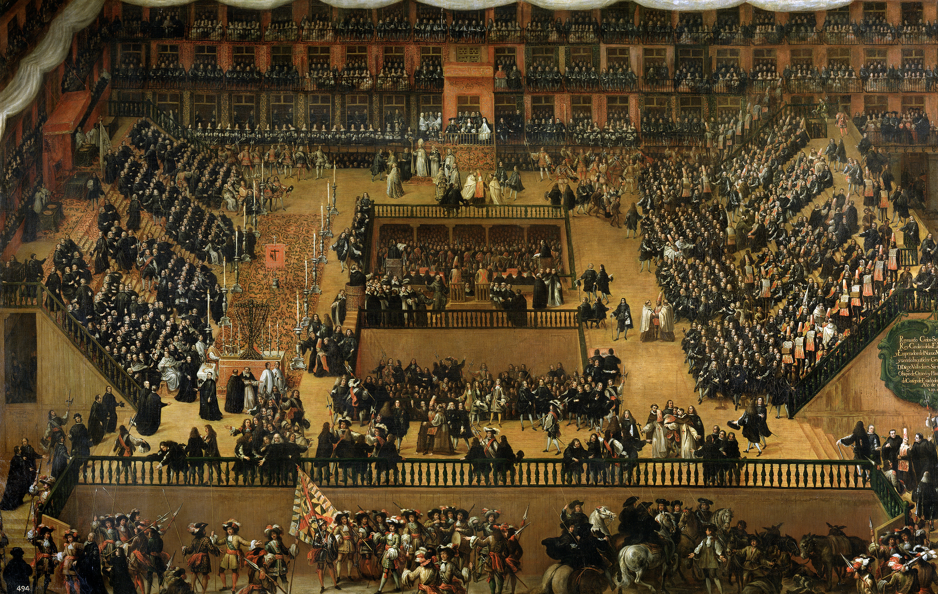 La obra representa un auto de fe celebrado en Madrid el día 30 de junio de 1680, durante el reinado de Carlos II de España. El auto se celebró en la plaza Mayor y duró toda una jornada. Al fondo vemos la tribuna real y en ella a Carlos II, a su mujer María Luisa y a su madre. En los balcones, se ubican personas distinguidas de la corte. A la izquierda, rica alfombra y sobre ella el altar con la cruz verde, simbolizando la esperanza de perdón de los reconciliados, y el estandarte del Santo Oficio. Al lado, las gradas de los cargos públicos, y el solio del inquisidor general quien todavía está junto a la tribuna del rey después de haberle tomado juramento. En el centro del cuadro vemos a dos reos vestidos como en el siglo XV, con coroza y sambenitos con llamas, a los relatores o lectores de causas y sentencias en los púlpitos, y a unos dominicos con el predicador en el púlpito central. A la derecha están las gradas para los familiares de la Inquisición y los reos en persona o en estatua (muertos o huidos), la cual lleva una inscripción con sus delitos y una caja con sus huesos. Los reos podían ser penitenciados (castigados con diversas penas y que al abjurar de sus errores se convertían en reconciliados) o relajados (condenados a muerte en garrote, o en hoguera si eran reincidentes). En primer plano se ve a los soldados de la fe y los asnos que llevarán a los condenados a muerte a las afueras de la ciudad para ser ejecutados por la justicia secular. En este grupo de soldados en la parte inferior central del cuadro, encontramos una figura masculina que porta un tambor de grandes dimensiones muy utilizado en este tipo de ceremonias.